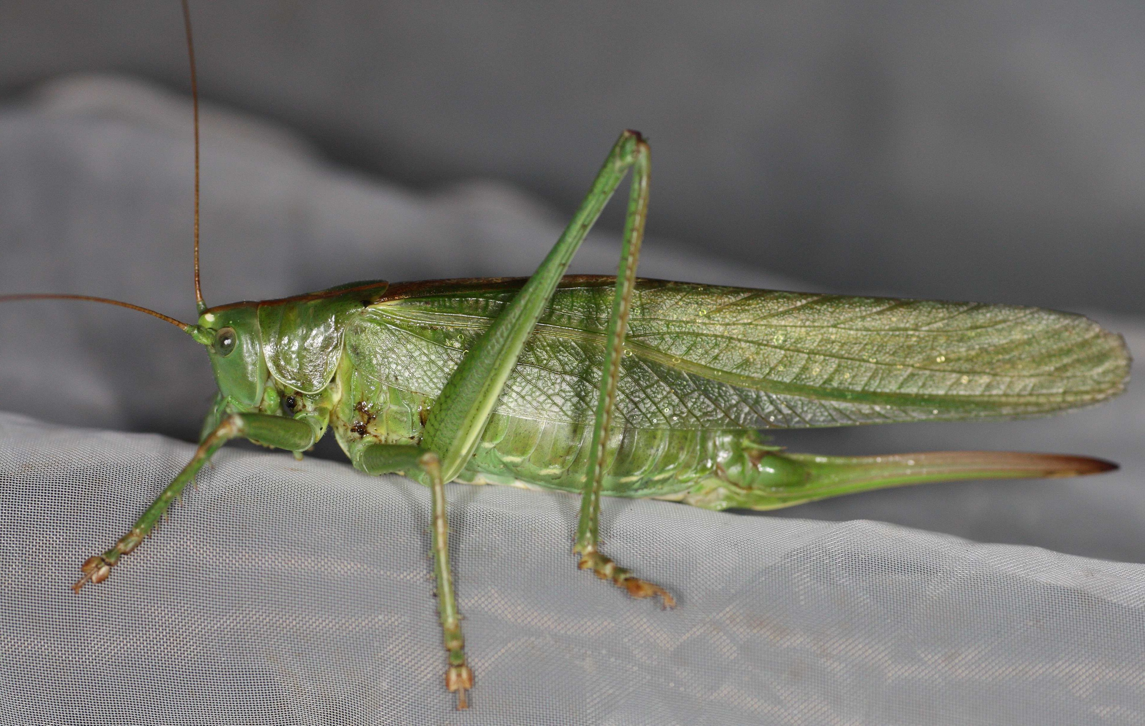 Hunn av grønn løvgresshoppe Tettigonia viridissima med langt eggleggingsrør.Template:Byline